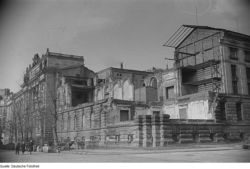 Original image description from the Deutsche Fotothek Blick auf die Universitätsbibliothek Albertina